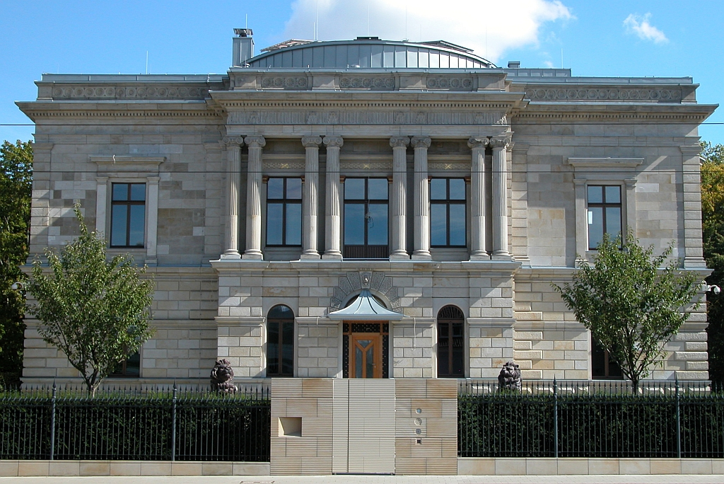 Braunschweig: Vorderseite der Villa Rimpau, von der Wolfenbütteler Straße aus gesehen.